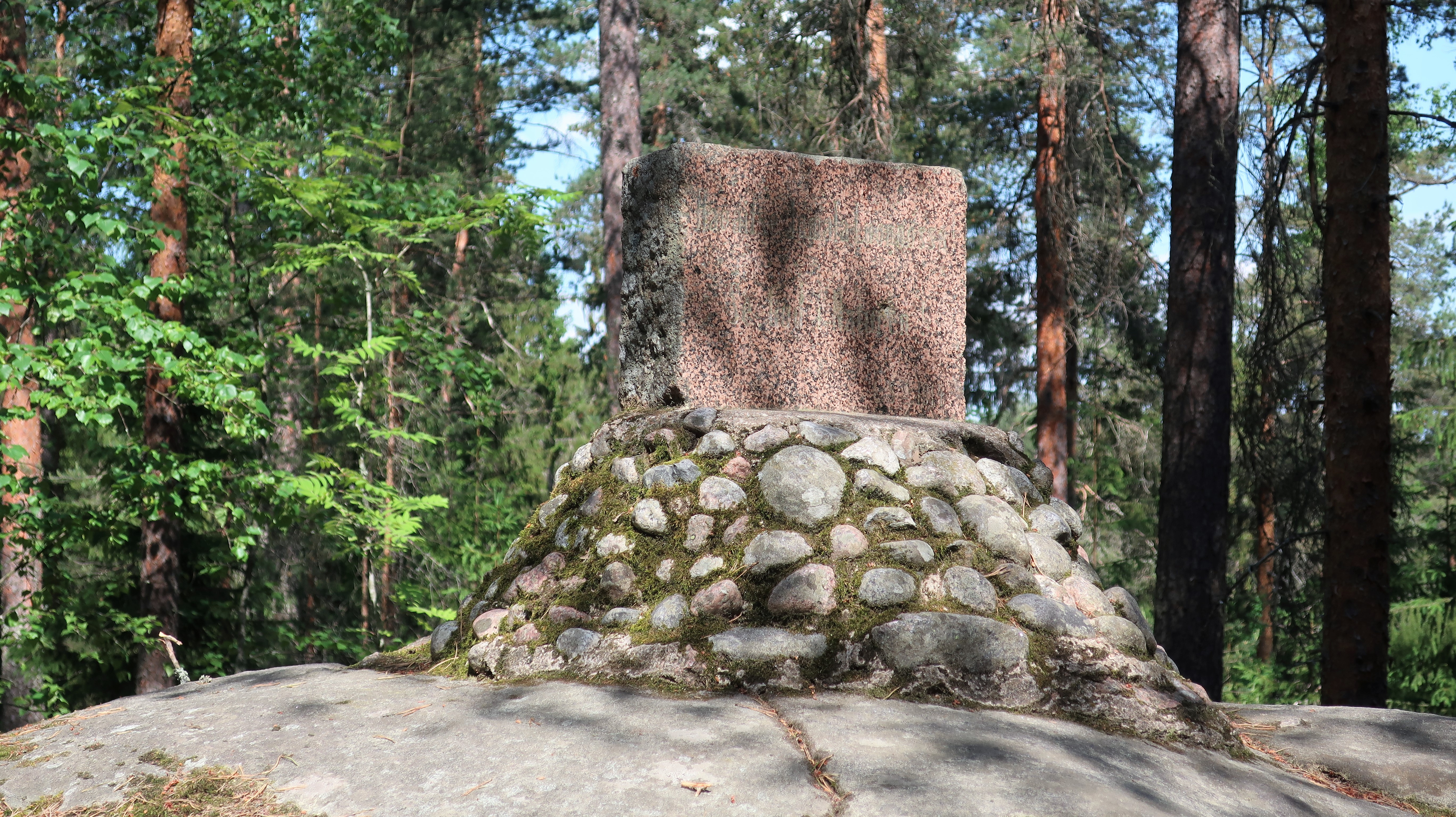 kuva graniittilevyn hiotulta puolelta, jossa on epitafi